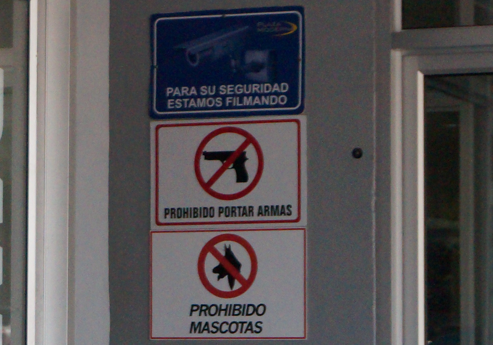 Letrero en un centro comercial, que prohíbe las armas dentro de los establecimientos. Lugar San Pedro Sula